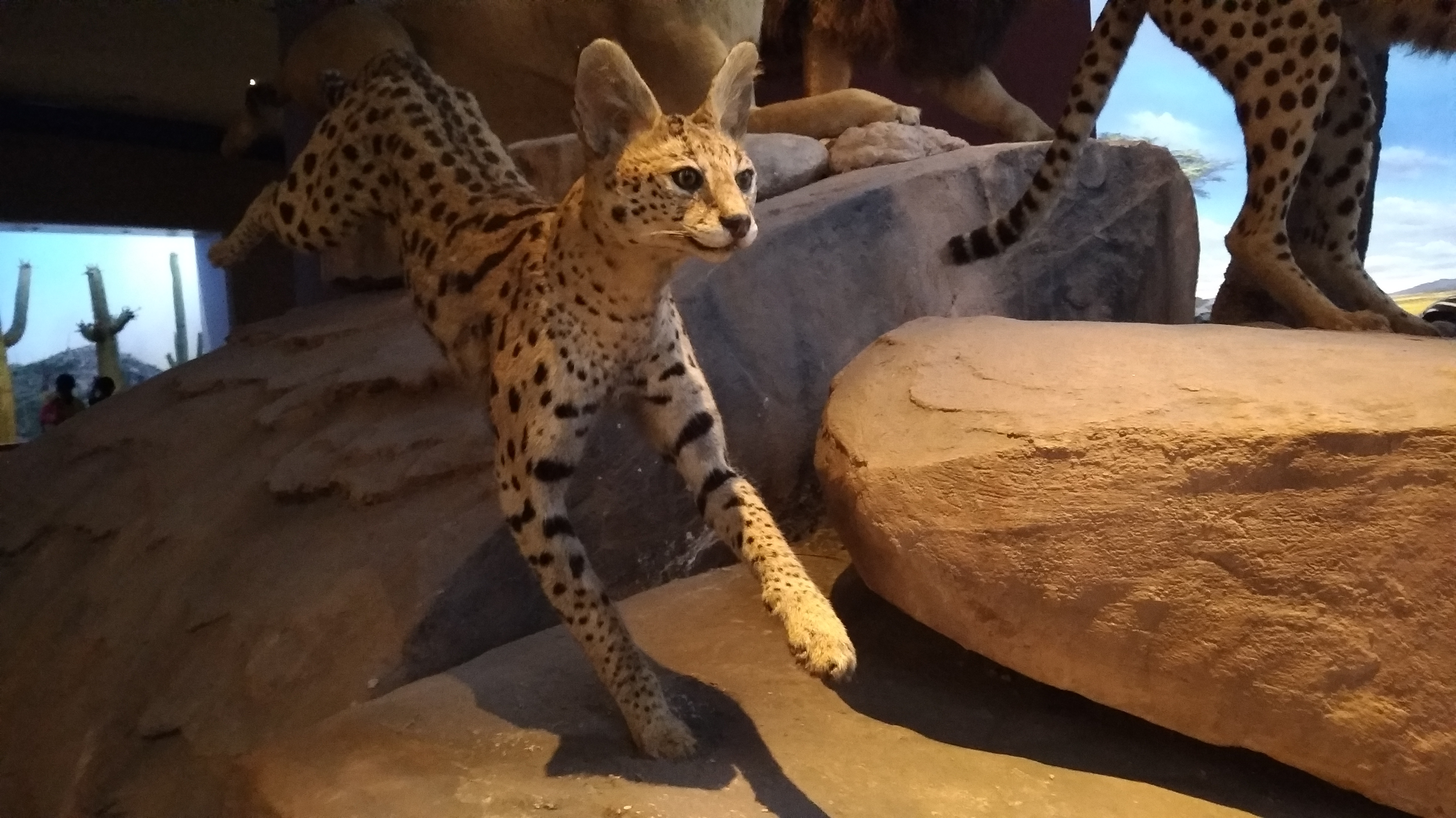 中文（台灣）: 中華民國國立自然科學博物館的藪貓模型